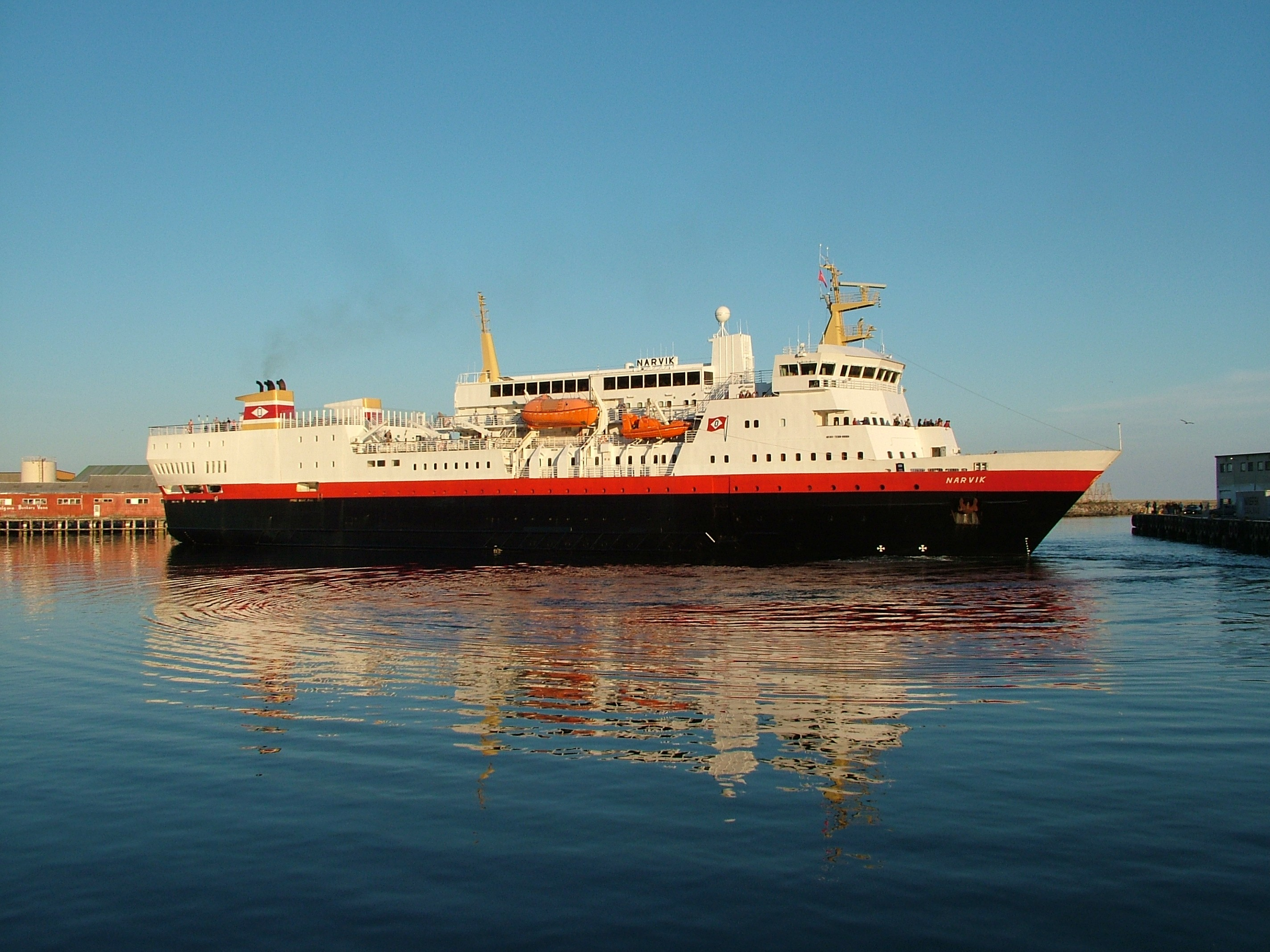 MS Narvik, ein Hurtigrutenschiff, beim Wenden im Hafen von Svolvaer, Lofoten